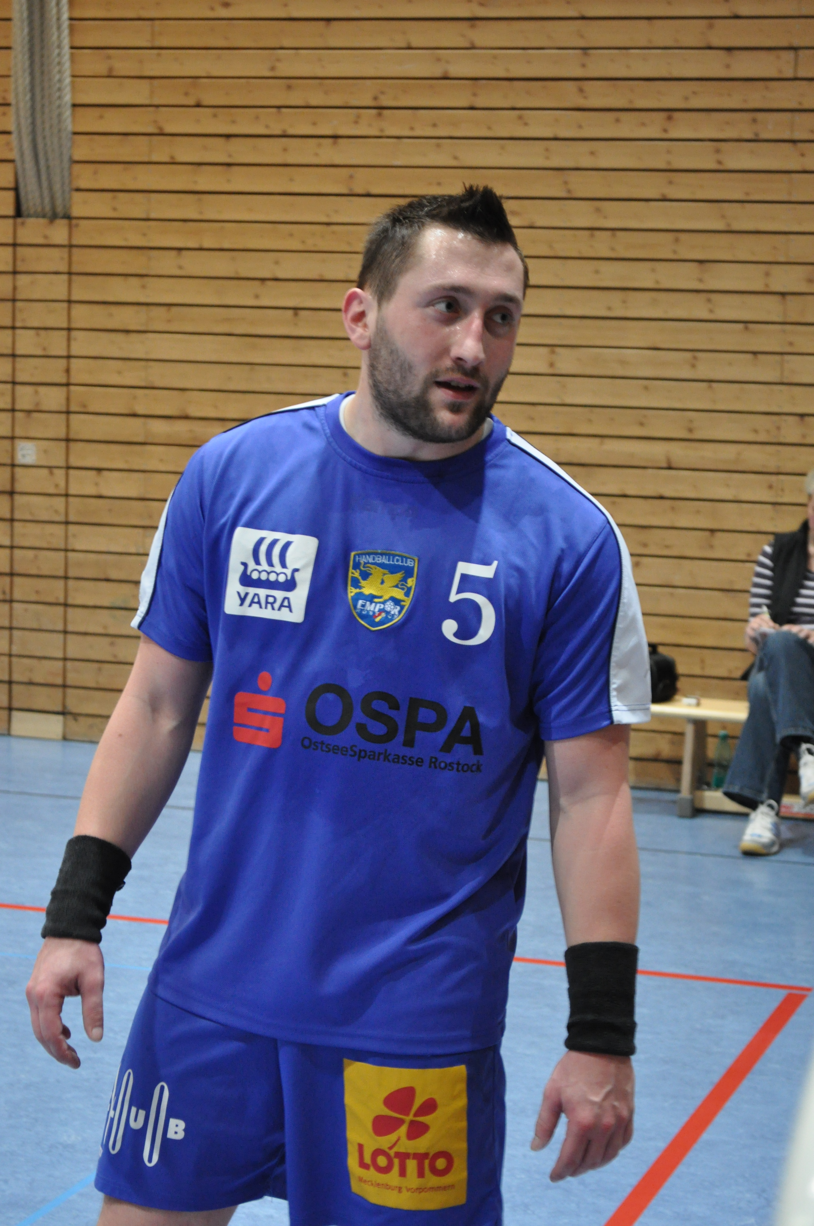 Michael Köhler beim Benfizspiel des Stralsunder HV gegen den HC Empor Rostock in der Stralsunder Diesterweg-Sporthalle am 10. März 2010. Stralsund gewann das Spiel mit 30:26.